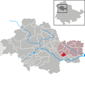 Klettstedt in Thuringia - Unstrut-Hainich-Kreis